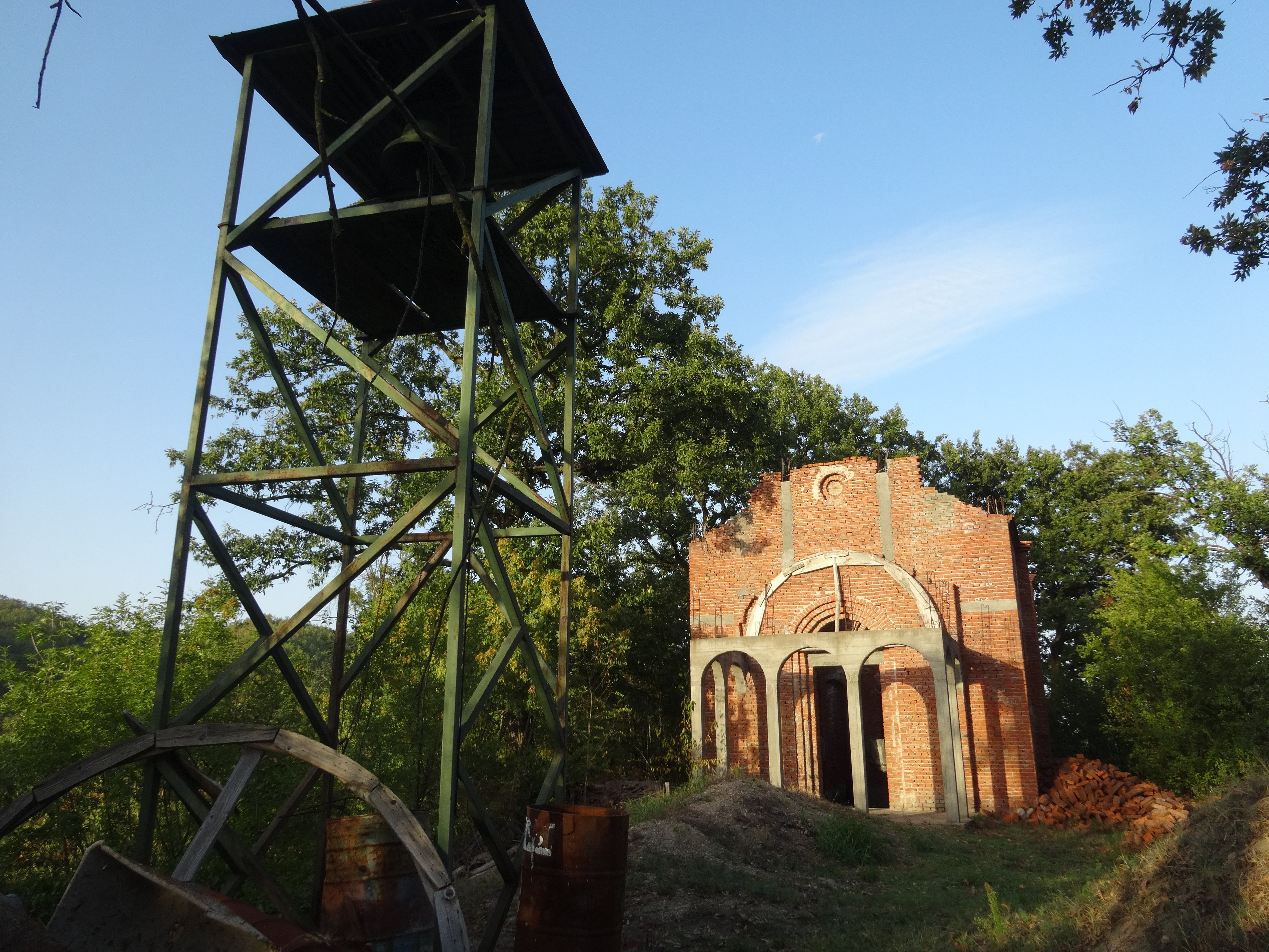 Vina, Leskovac